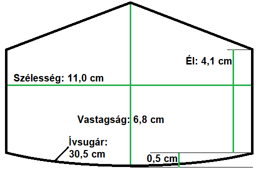 Krikettütő-idomszer